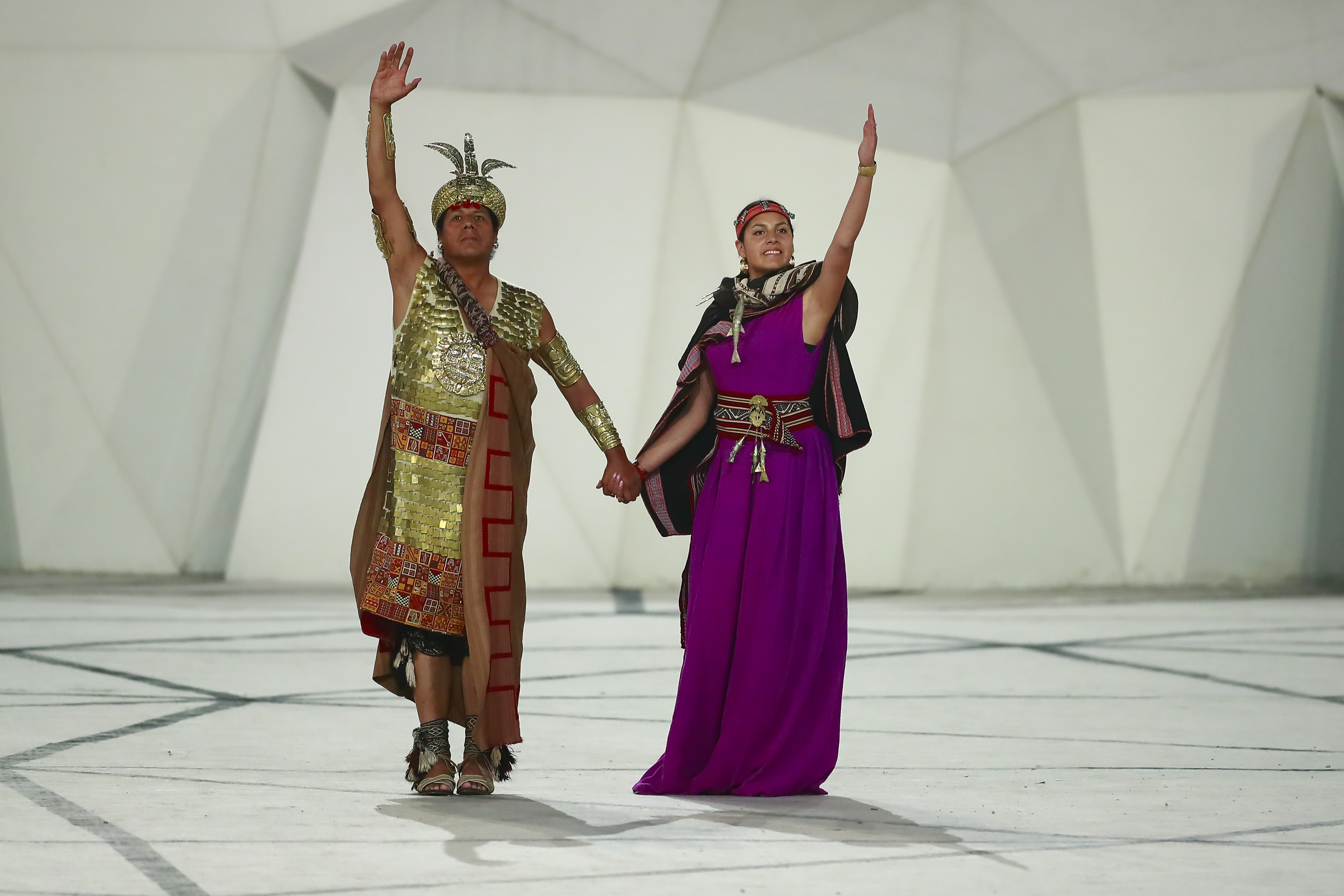 CEREMONIAS El Perú y el mundo fueron testigos de cuatro ceremonias inolvidables. La Ceremonia de Inauguración de los Juegos Panamericanos se llevó a cabo la noche del 26 de julio con cerca de 6700 deportistas que desfilaron animados por un playlist armado con los mejores ritmos peruanos. Más de 30 mil personas llenaron el Estadio Nacional en una noche mágica donde uno de los grandes invitados fue el cantante internacional Luis Fonsi. El momento emotivo llegó con el dueto que armaron Juan Diego Florez y la recordada Chabuca Granda. La Ceremonia de Clausura de los Panamericanos se realizó el 11 de agosto con un fin de fiesta a cargo del querido Gian Marco. Fueron 955 artistas quienes integraron el elenco, de los cuales 893 eran voluntarios. Los Juegos Parapanamericanos, en tanto, fueron inaugurados el 23 de agosto en el Estadio Nacional con el desfile de las 30 delegaciones, donde la música estuvo a cargo del grupo Bareto. Mientras que la Clausura fue un fin de fiesta en el Estadio Atlético ante más de 5 mil espectadores que bailaron con la música de los Hermanos Yaipén y disfrutaron de la emoción de Eva Ayllón.